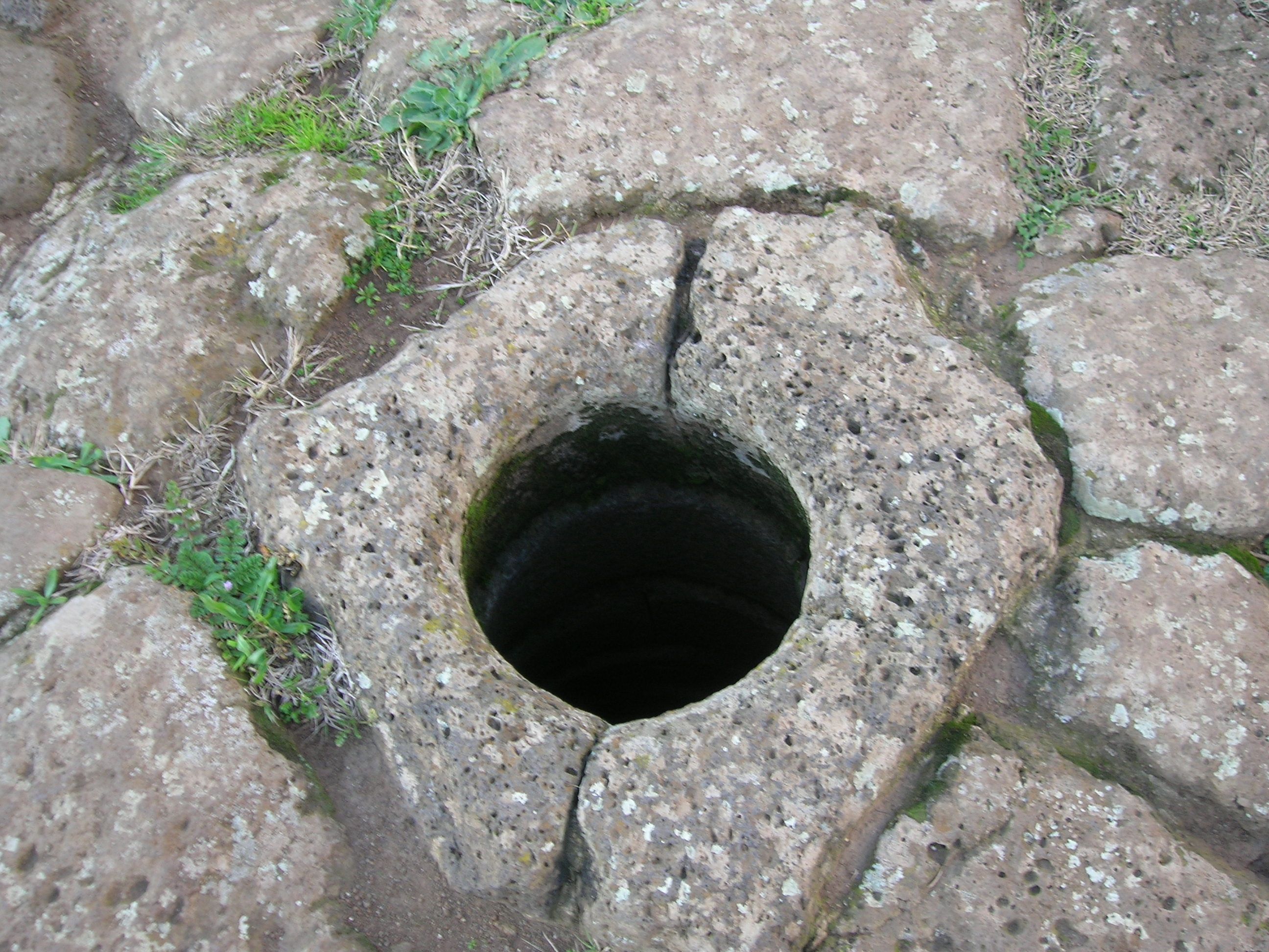 pozzo sacro di Santa Cristina (Oristano)